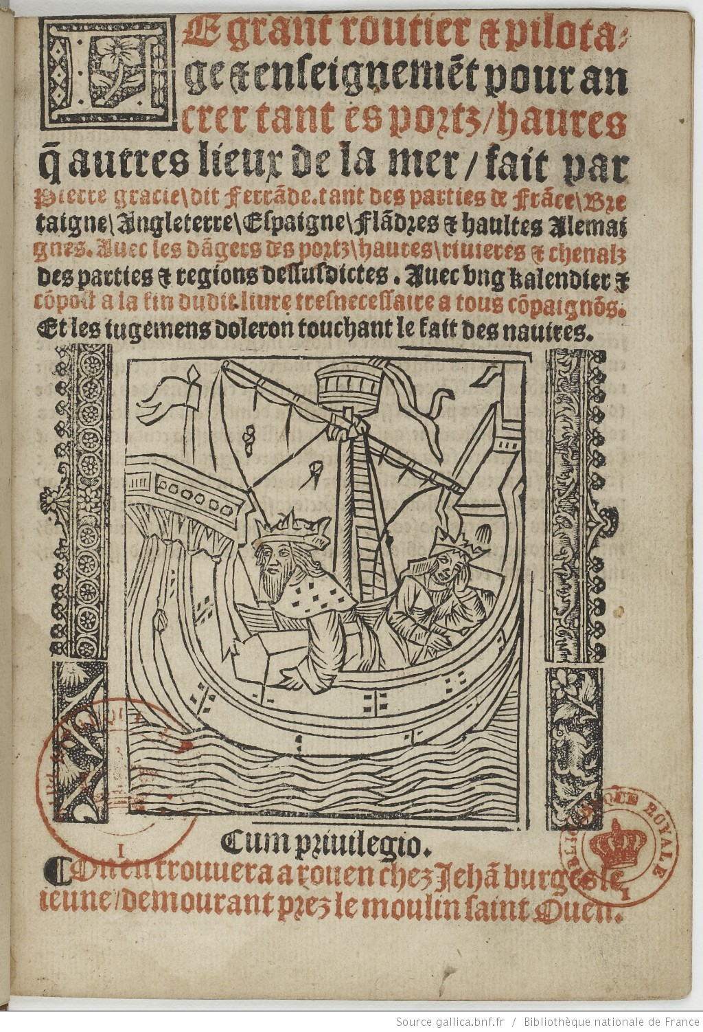 Le Grant routier et pilotage et enseignement pour ancrer tant ès ports, havres que autres lieux de la mer : fait par Pierre Gracie, dit Ferrande, tant des parties de France, Bretaigne, Angleterre, Espaigne, Flandres et haultes Alemaignes... avec ung kalendrier et compost... et les jugemens d'Oléron touchant le fait des navires. Auteur: Pierre Garcie-Ferrande